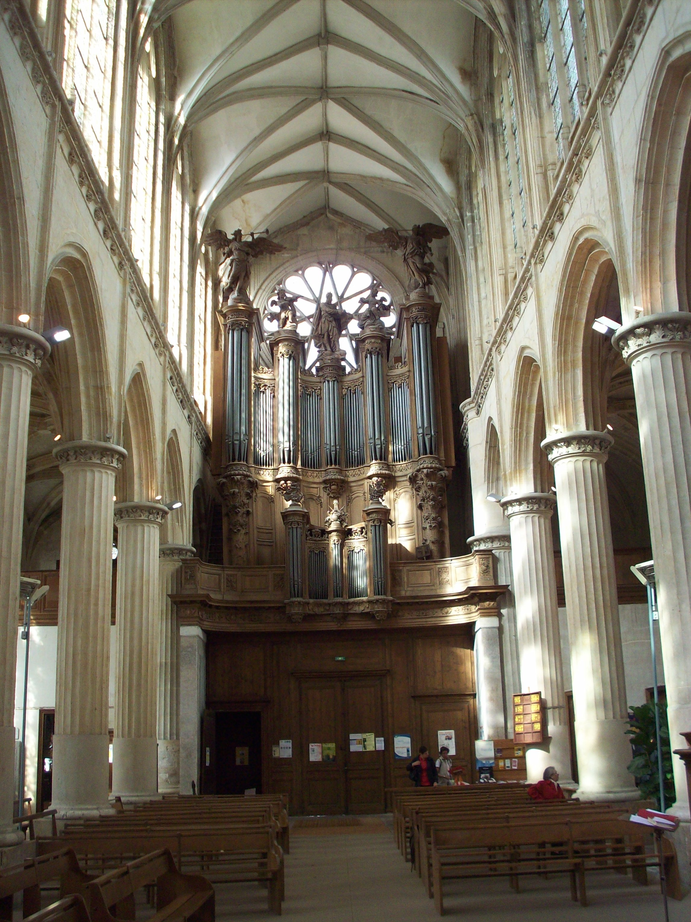 Vue de la nef avec l'orgue en fond.